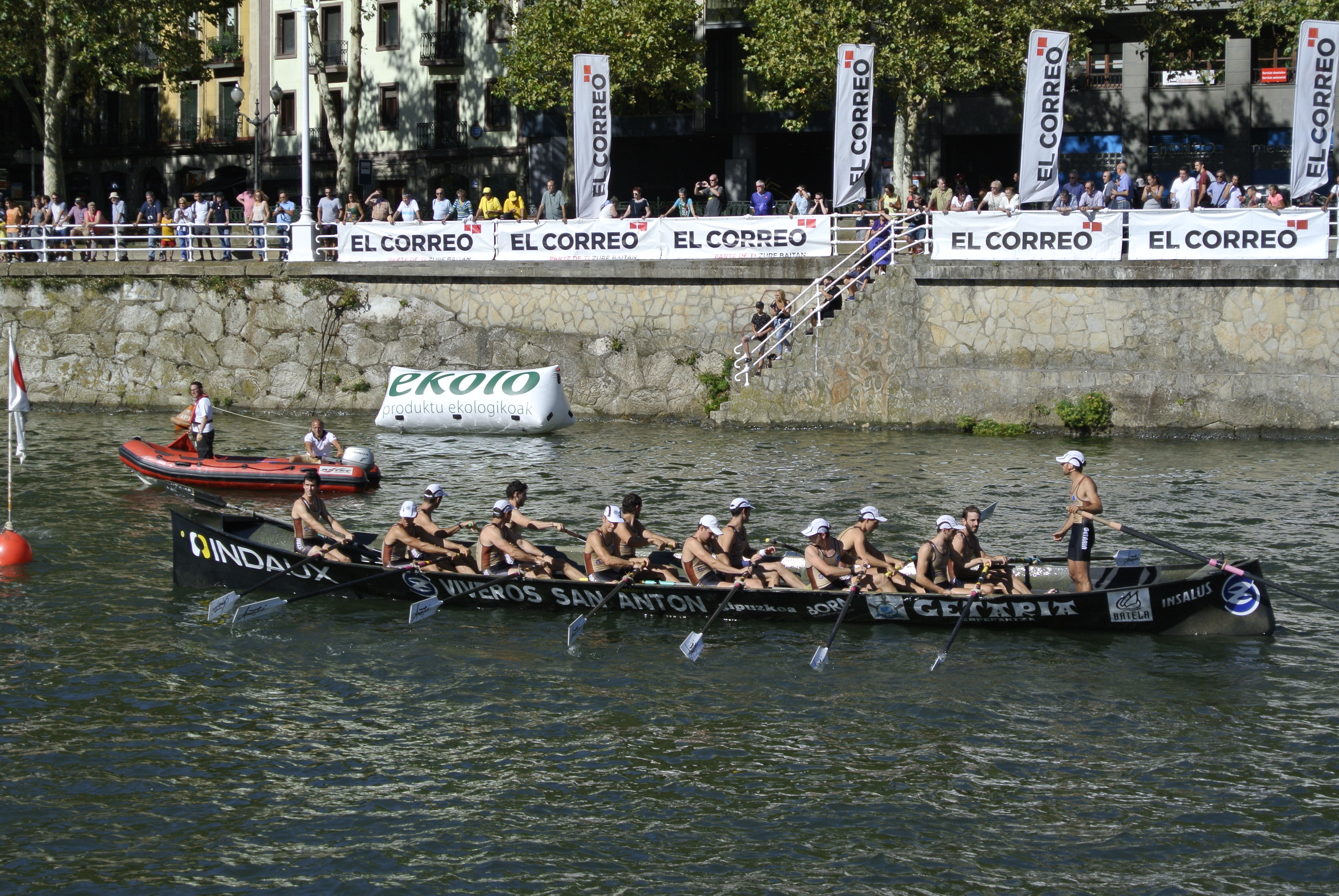 Trainera de Getaria en Bilbao, en la última jornada de la liga ARC-1